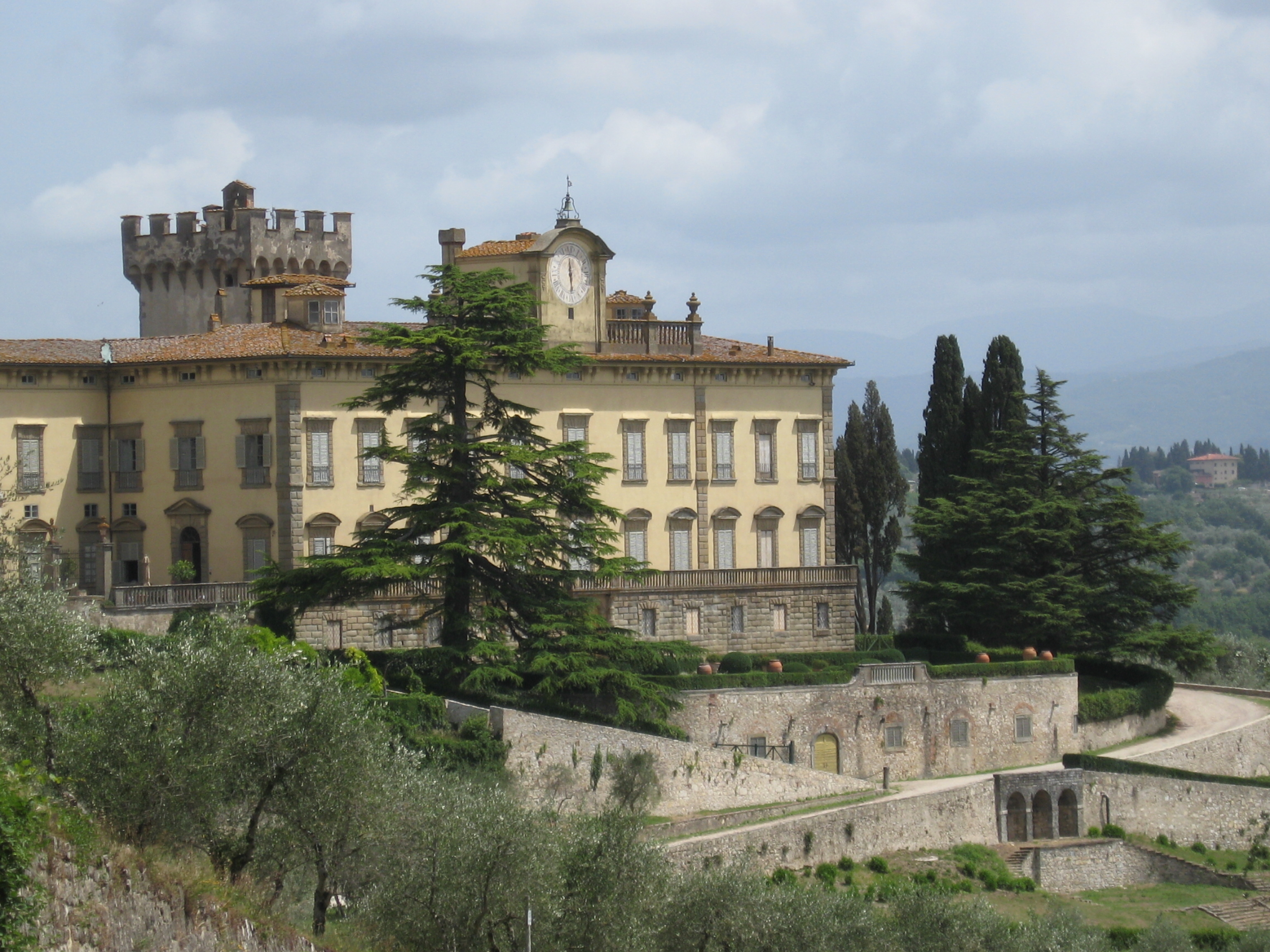 Vista della Villa di Torre a Cona, lato est